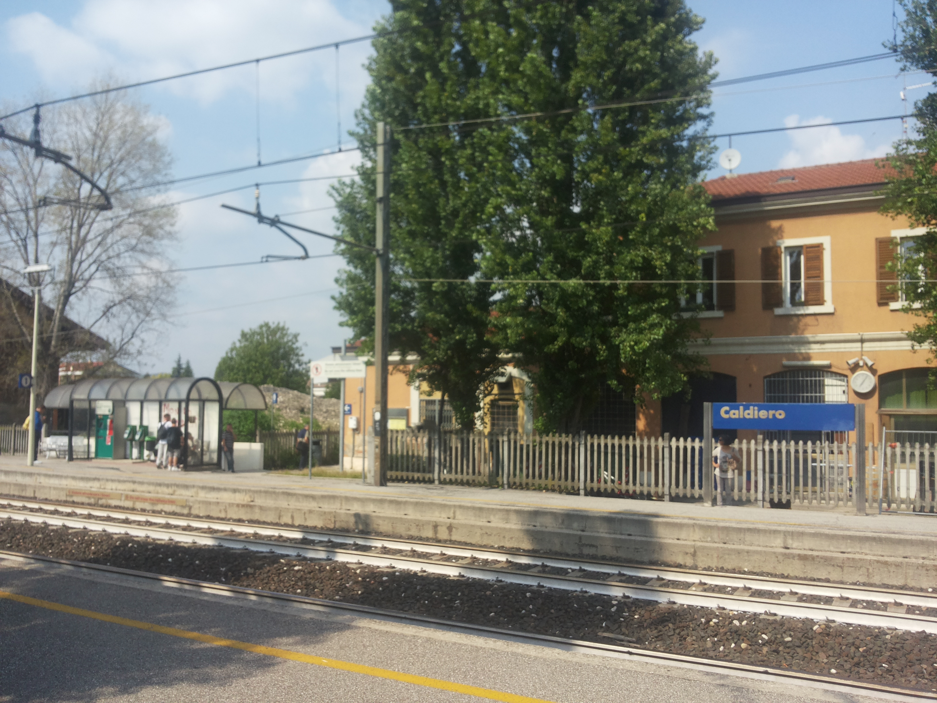 Stazione ferroviaria di Caldiero